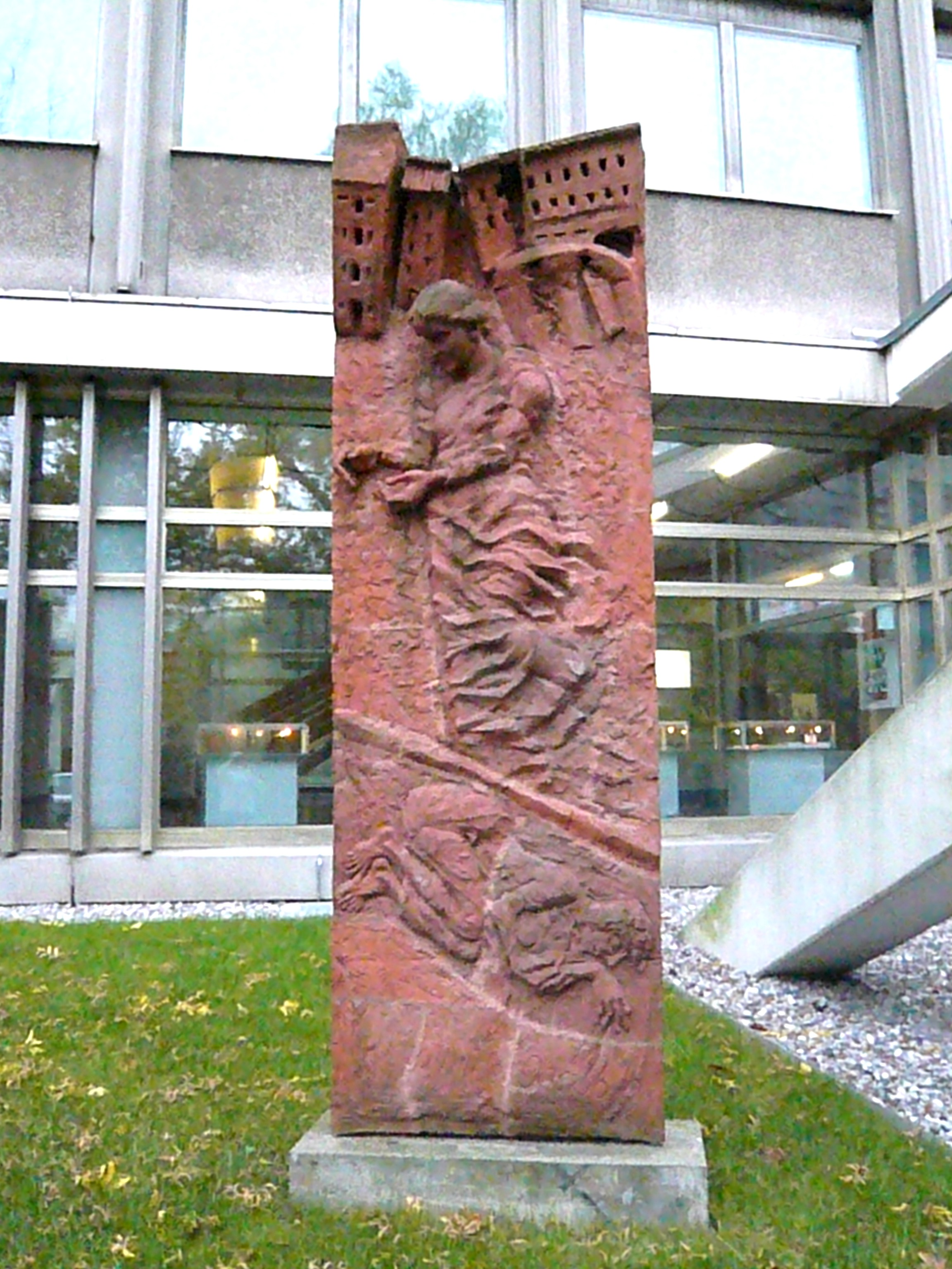 Straße im Ortsteil Berlin-Friedrichshain/ Franz-Mehring-Platz